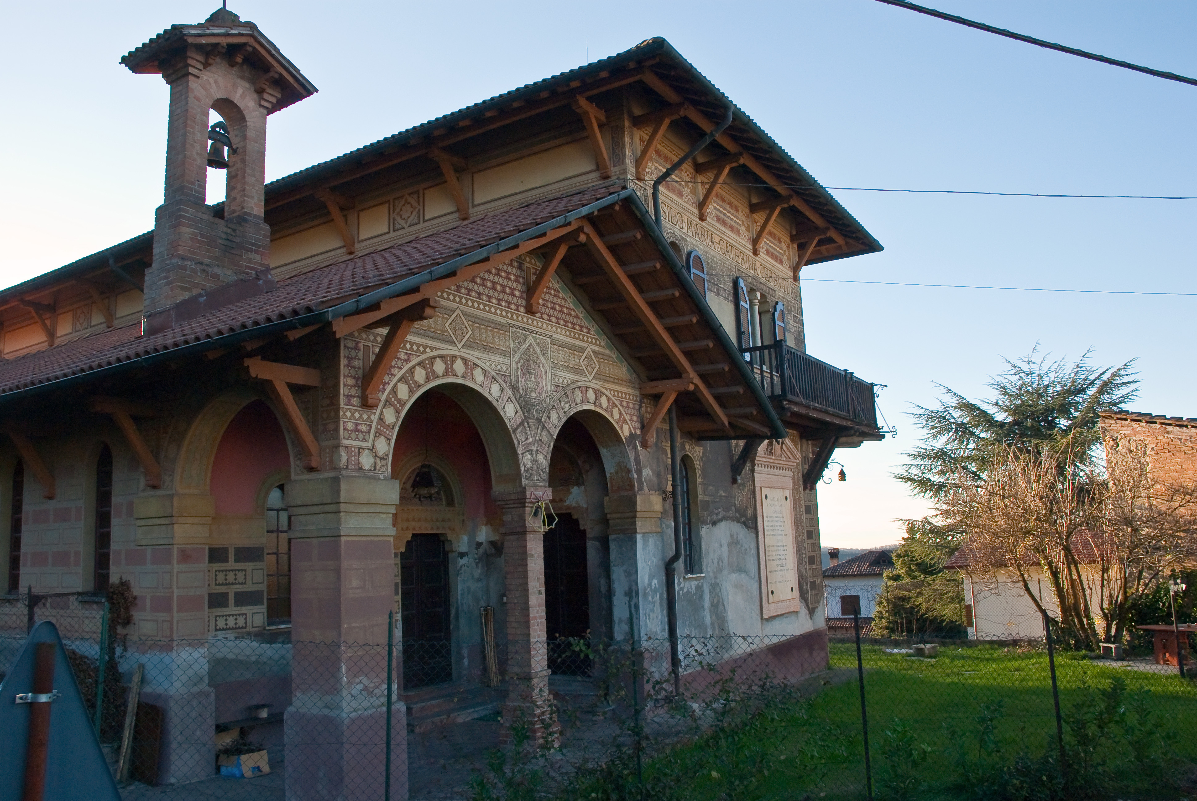 Ex asilo opera dell'Architetto Coppedè donato al paese dalla famiglia Ceutti